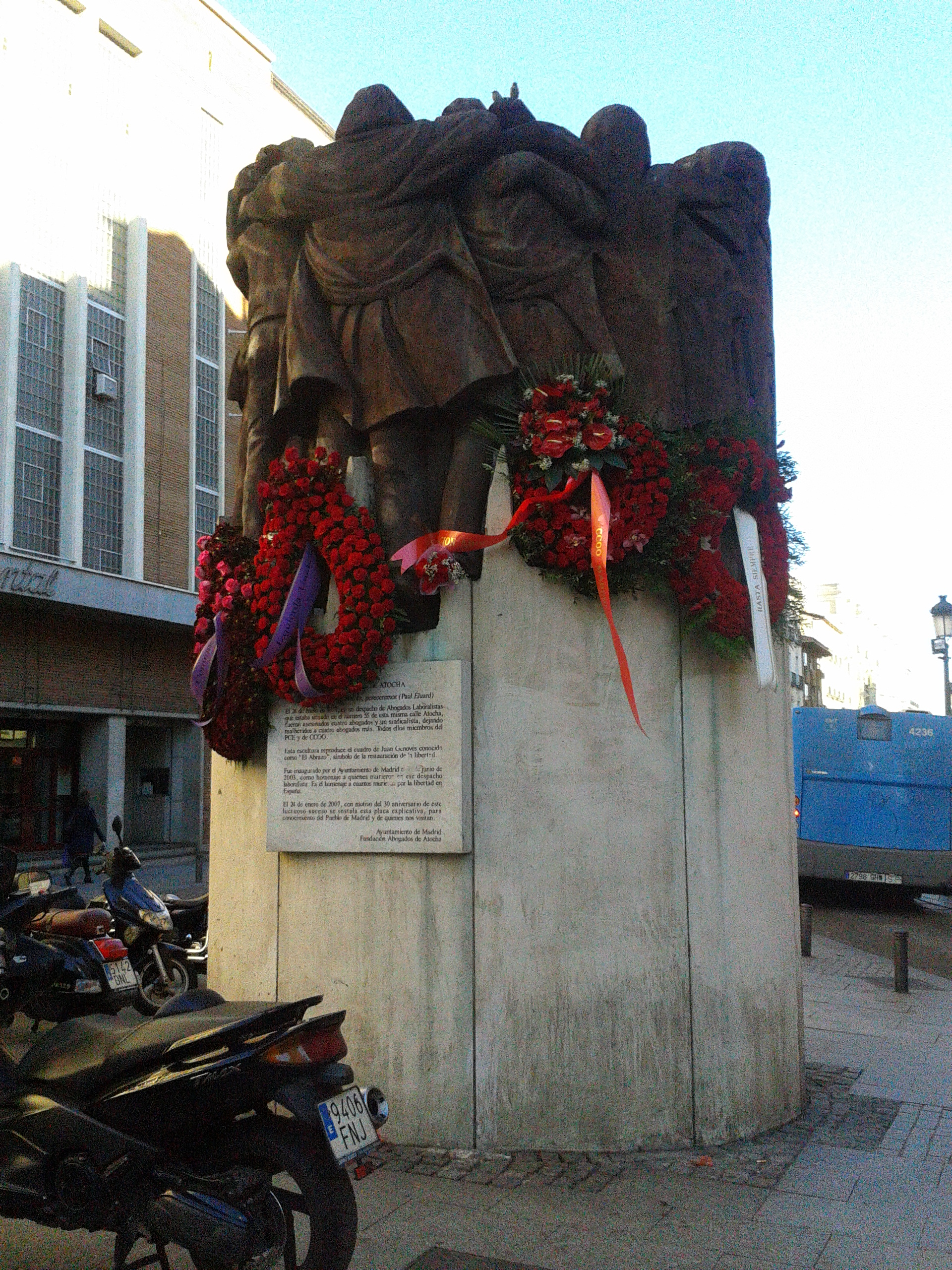 homenaje a los abogados laboralistas muertos en la matanza de Atocha